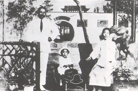 1921년의 김구 가족사진 (김구, 장남 김인, 부인 최준례), 상하이